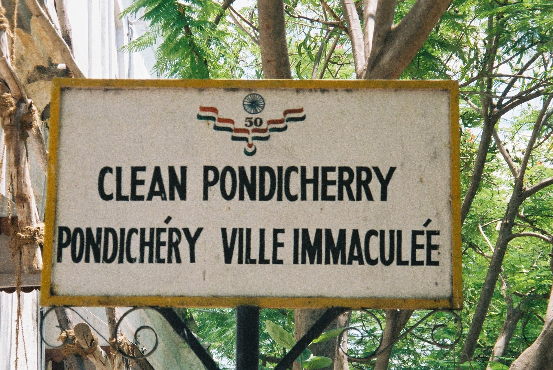 Panneau écrit en français à Pondichéry. Auteur: hélo